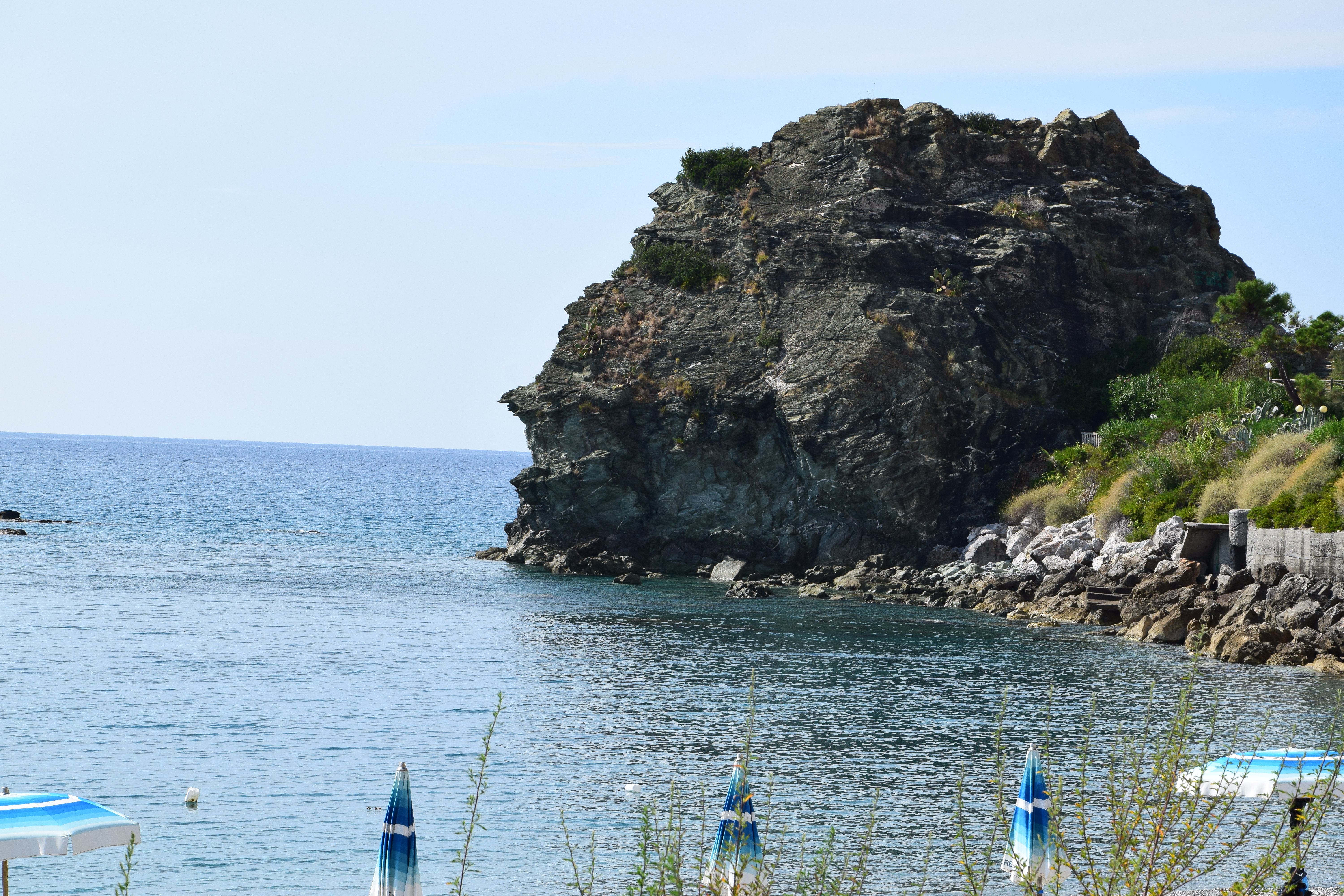 Scoglio di Coreca This is a photo of a monument which is part of cultural heritage of Italy.